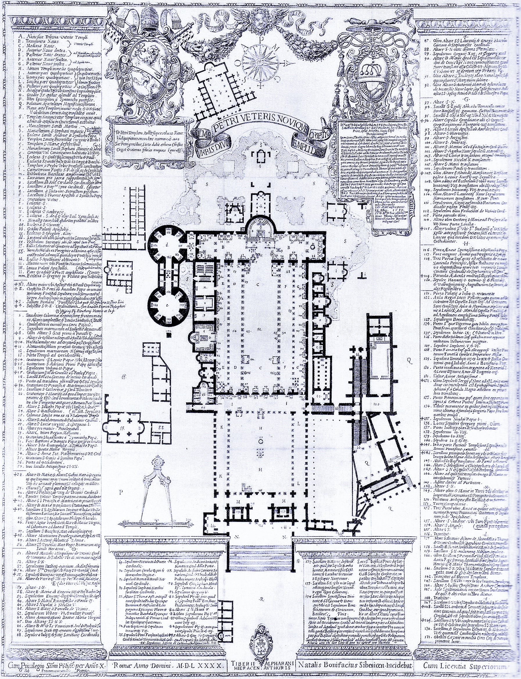 Plan de Saint-Pierre de Rome (image du domaine public modifiée)